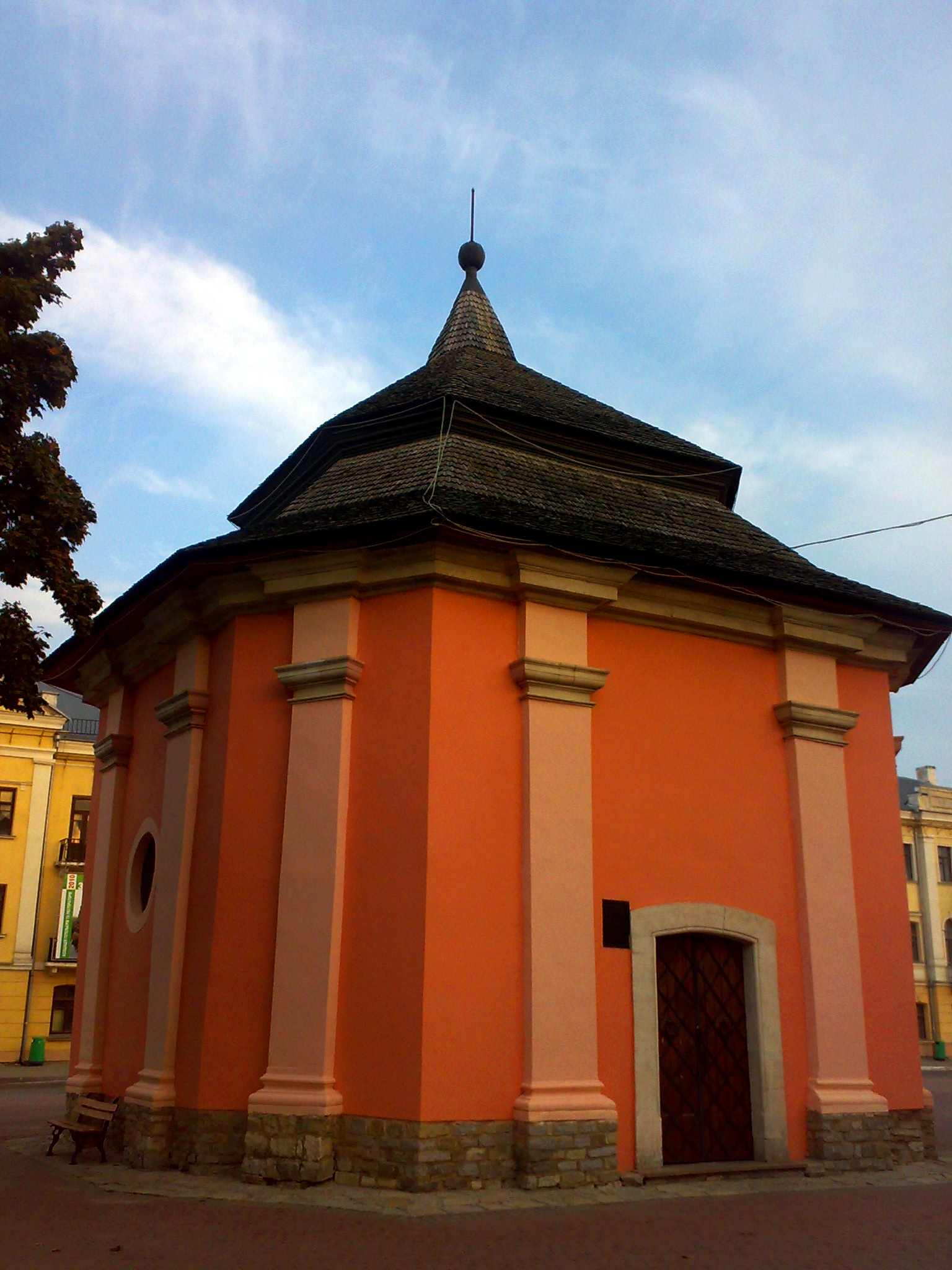 Вірменський колодязь (Кам'янець-Подільський)